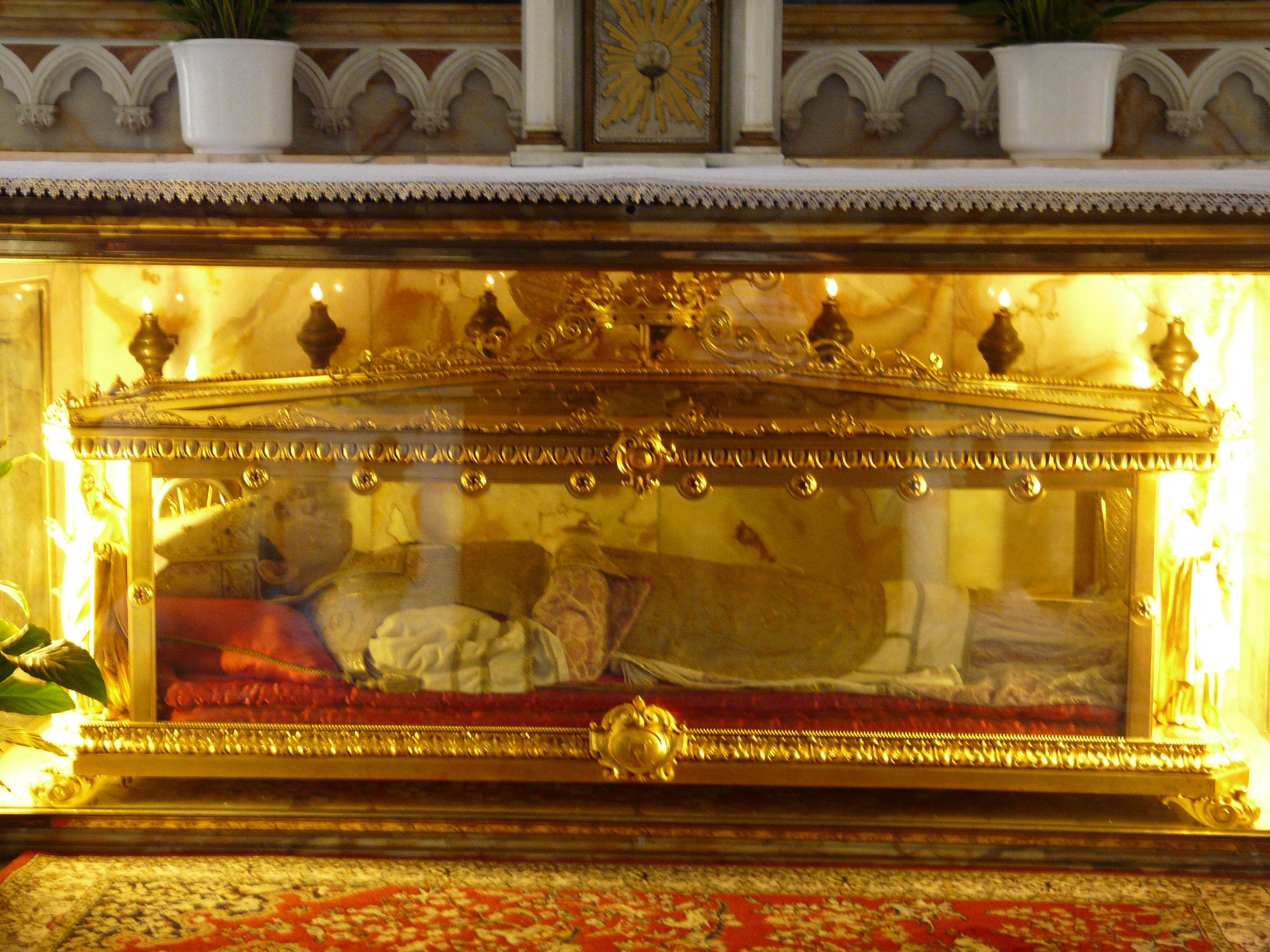 Immagini del duomo di Bobbio, Emilia-Romagna, Italia